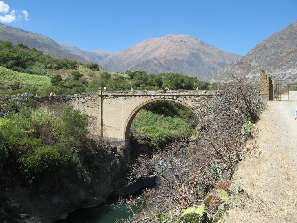 Puente Colonial Pachachaca Abancay